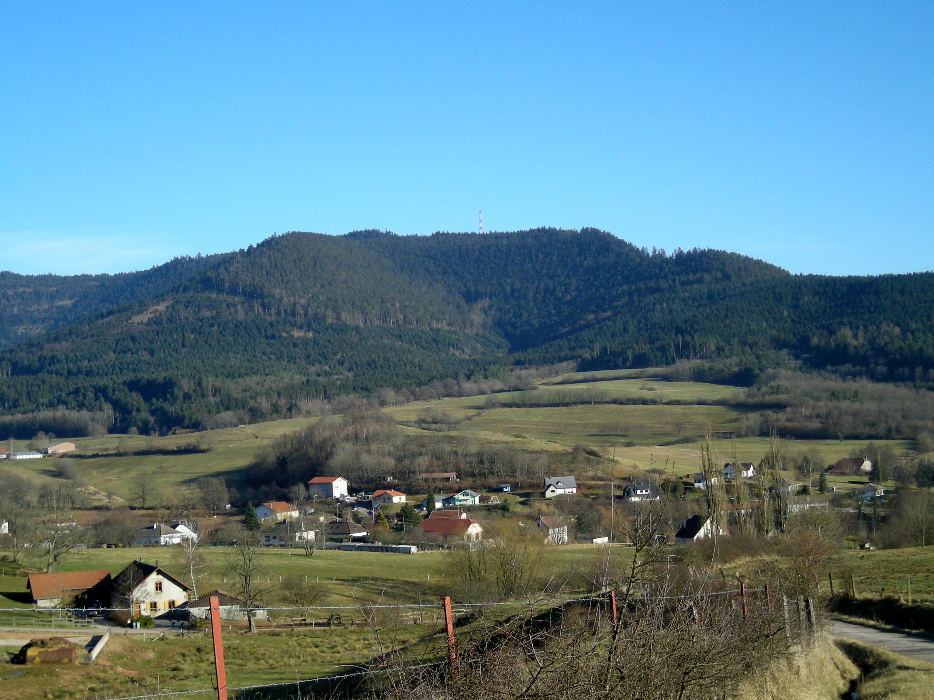 Robache (Saint-Dié des Vosges, France) au pied du massif de l'Ormont